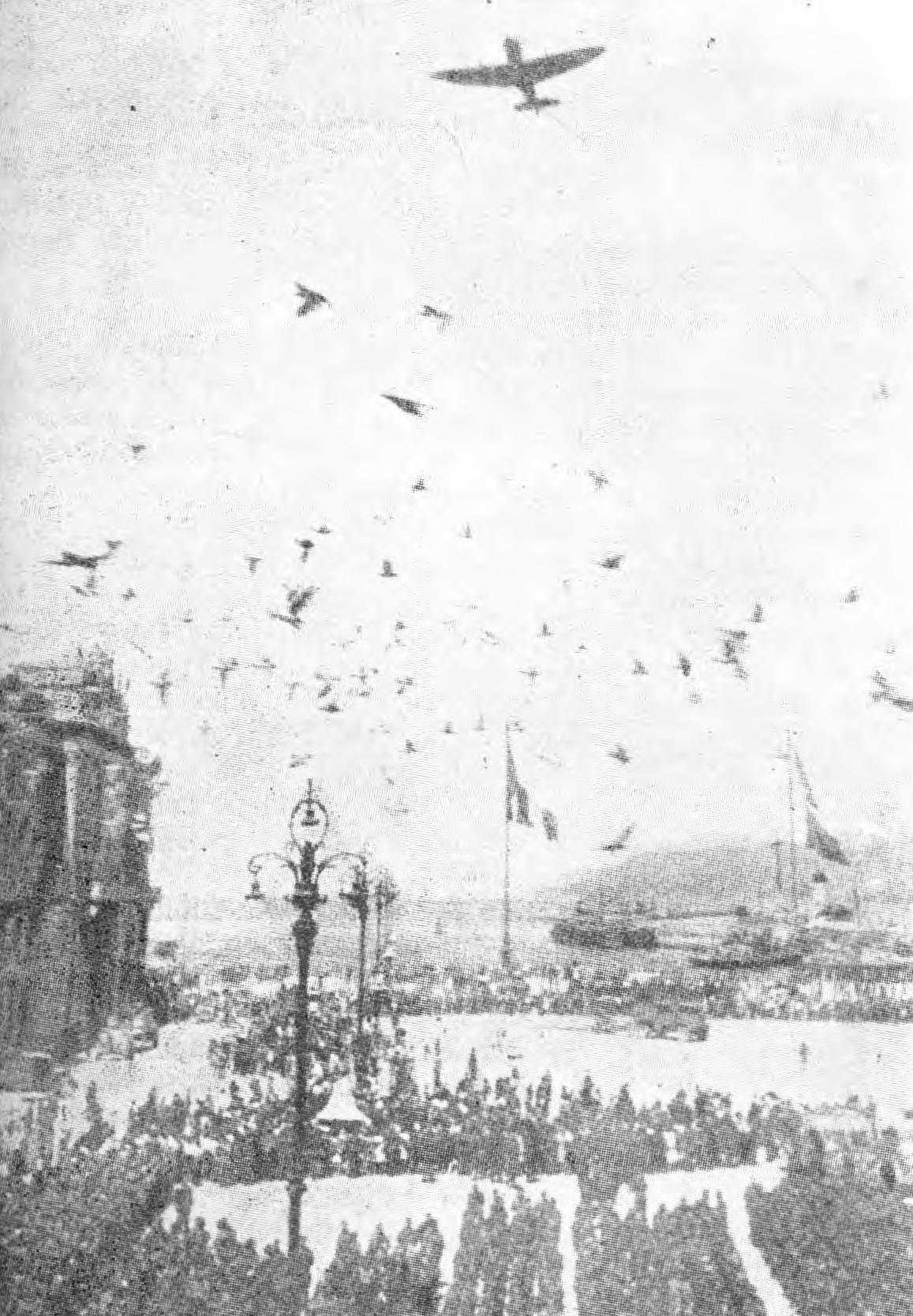 Slavnostna parada enot JA v Trstu